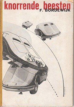 Omslag van de roman Knorrende beesten van de Nederlandse schrijver F. Bordewijk. Het ontwerp is in 1933 gemaakt door Andries Oosterbaan (1882-1935) op basis van een fotomontage van Kees Strooband. Zie Lex van de Haterd: 'Van boekbinder tot grafisch vormgever'. In: Zacht Lawijd 3: 1 (2003)